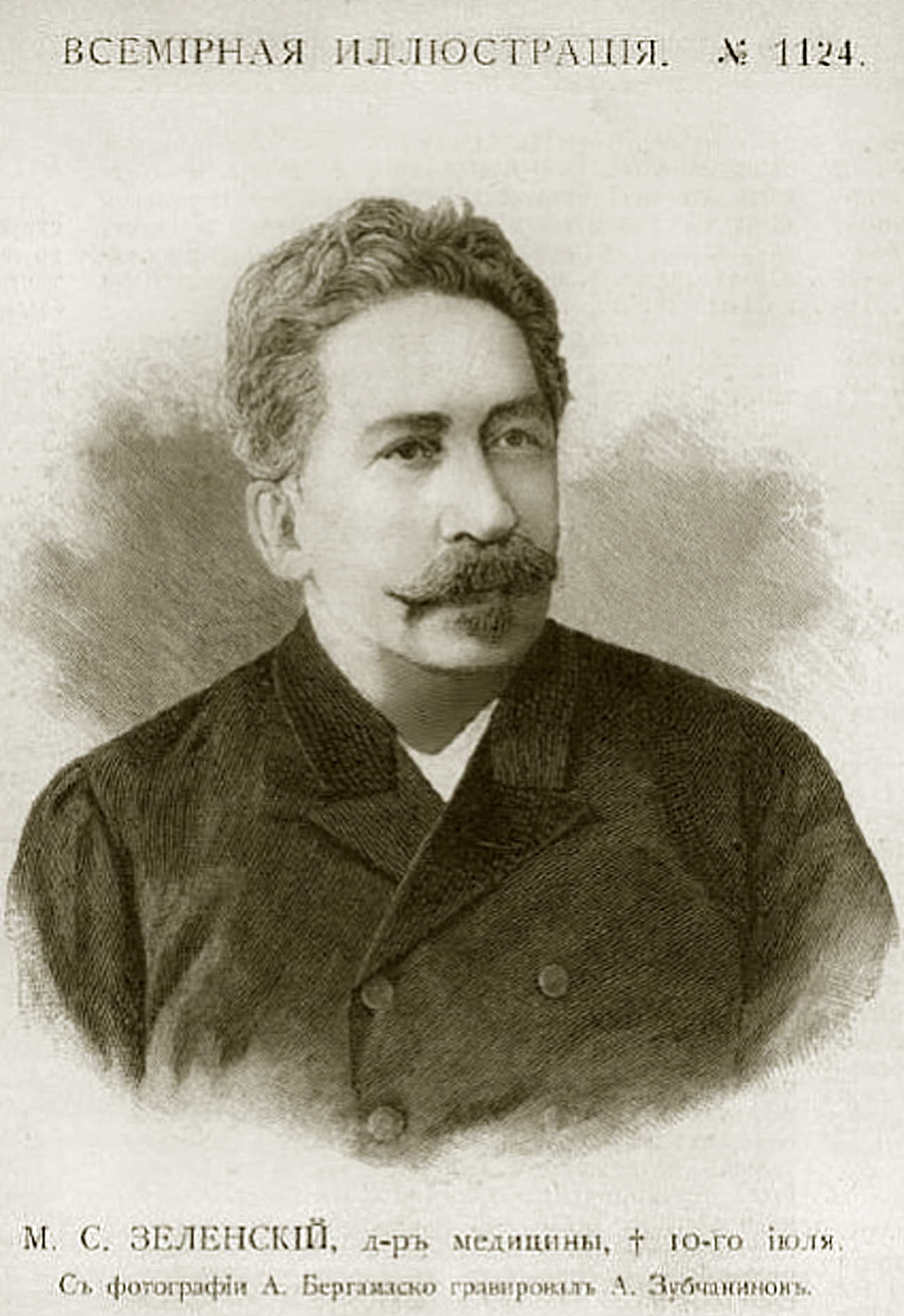 Доктор медицины, педиатр, приват-доцент Медико-хирургической академии Михаил Самойлович Зеленский